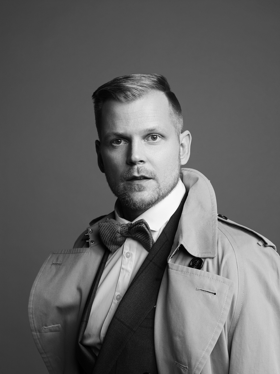 Antti Luusuaniemi